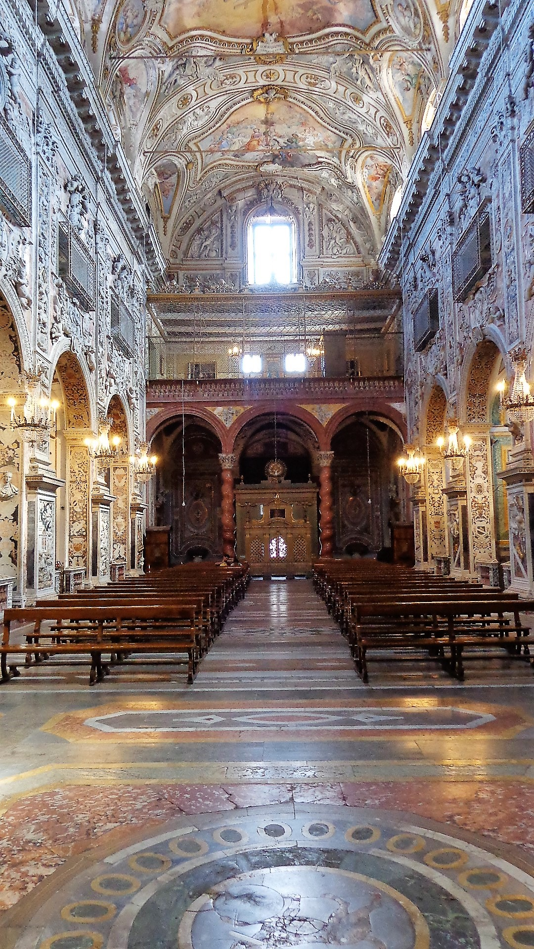 Controfacciata, coro, cantoria.